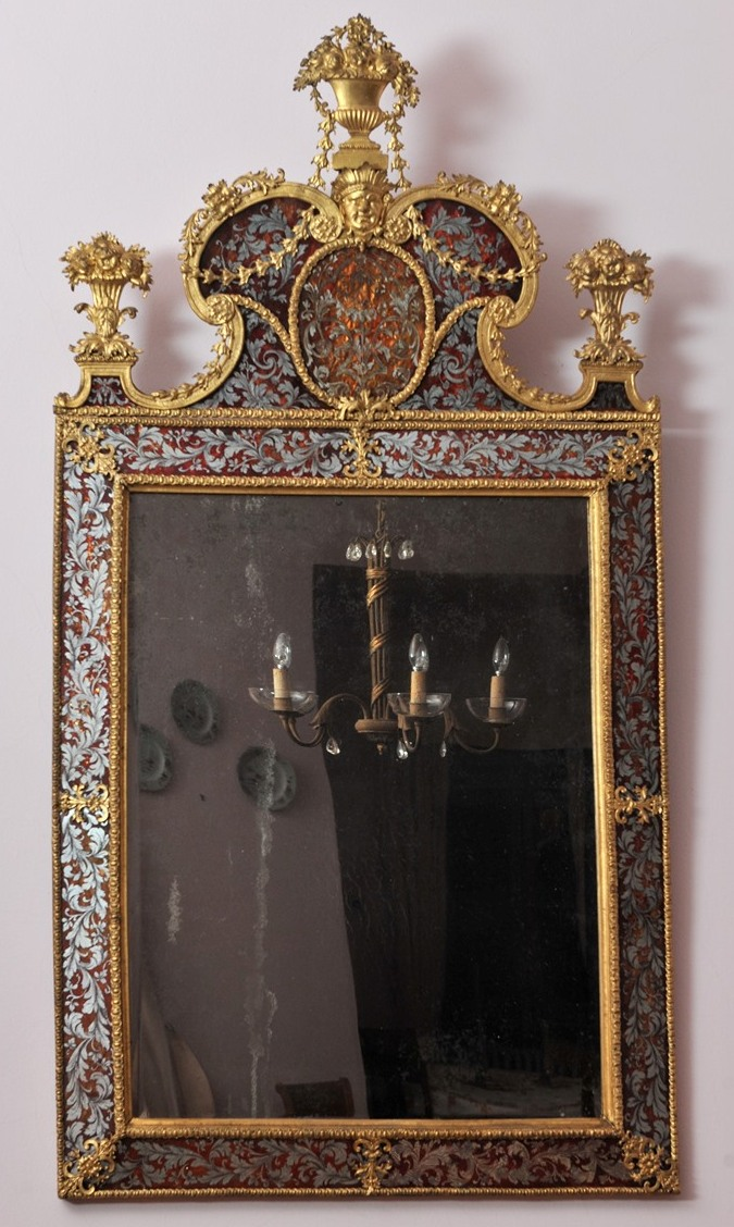 Miroir de Burchardt Precht. Les miroirs de Precht ont fait l'objet d'une conférence de Denis Bruyère, ébéniste créateur, conservateur-restaurateur d'oeuvres d'art et sculpteur ornemaniste, lors d'un colloque de l'APROA-BRK en 2013 : "Images, rayonnements et brillances du Grand Siècle".